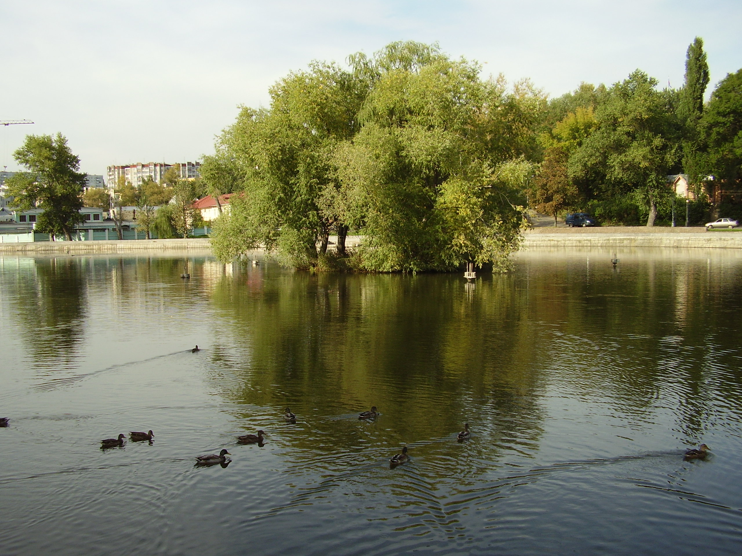 Липецк,пруд у магазина "Сказка"